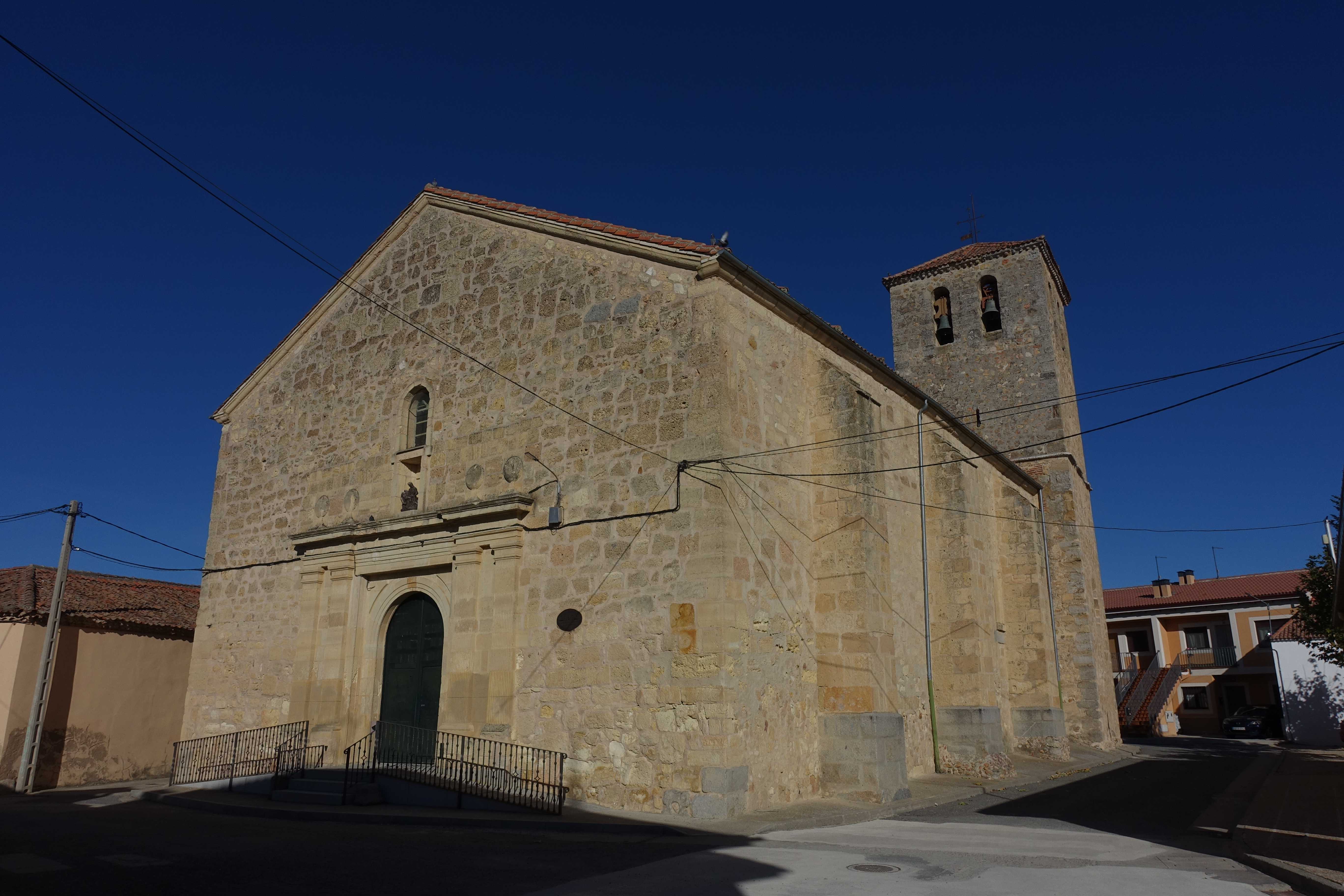 Iglesia de la Cruz, Garcillán (Segovia, España).